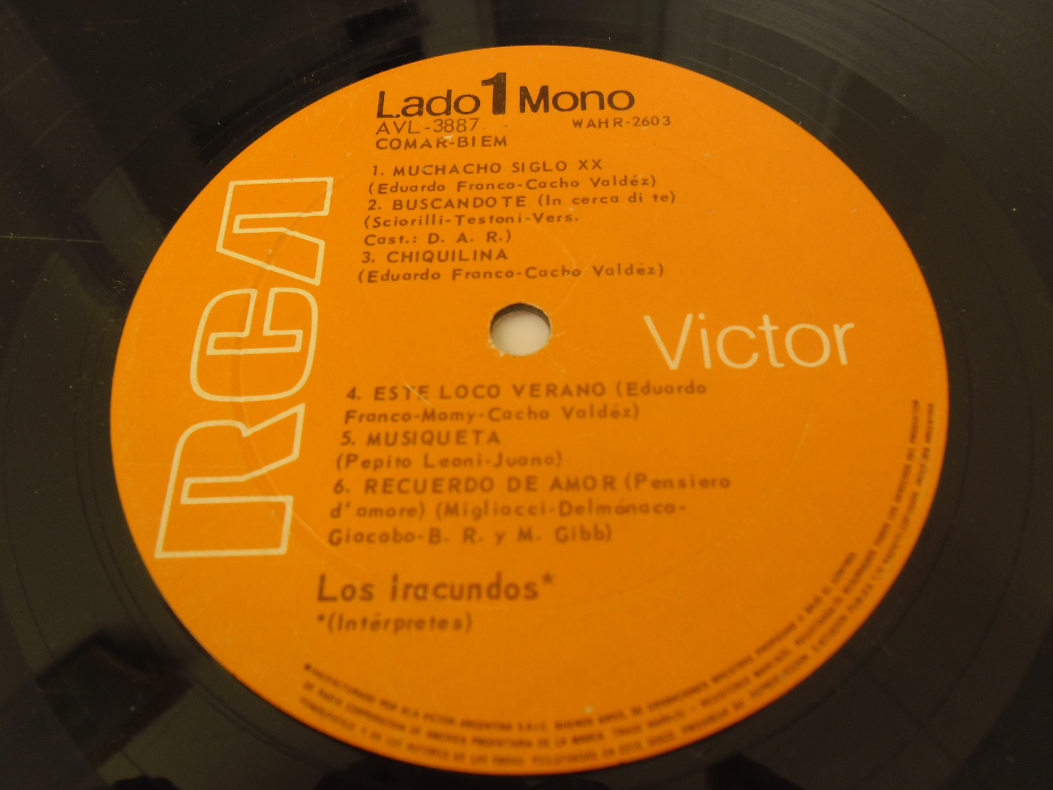 Long play del grupo Uruguayo Los Iracundos.